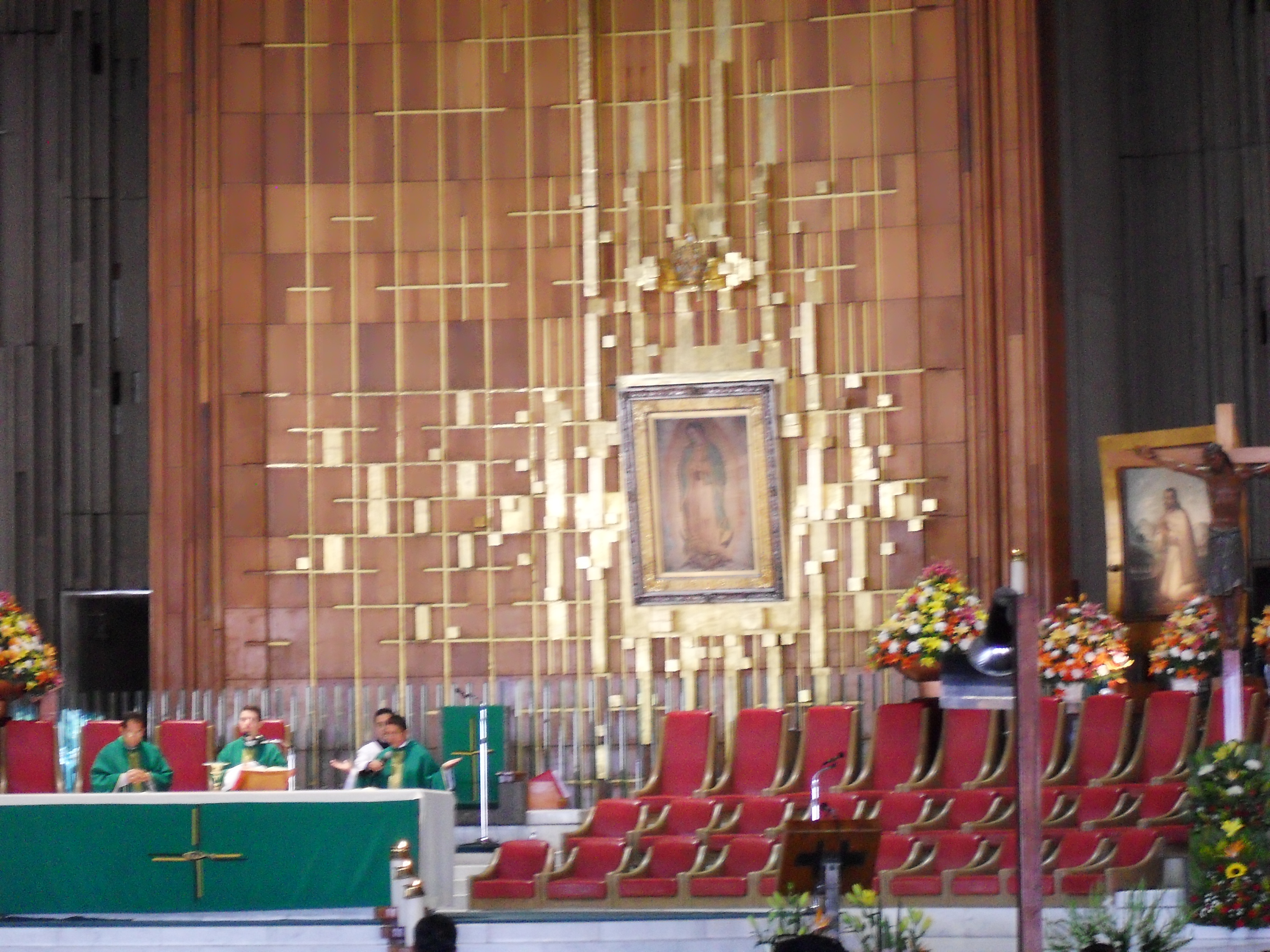 En este altar se encuentra la imagen de la Virgen de Guadalupe y mas a bajo se encuentra una imagen de San Juan Diego